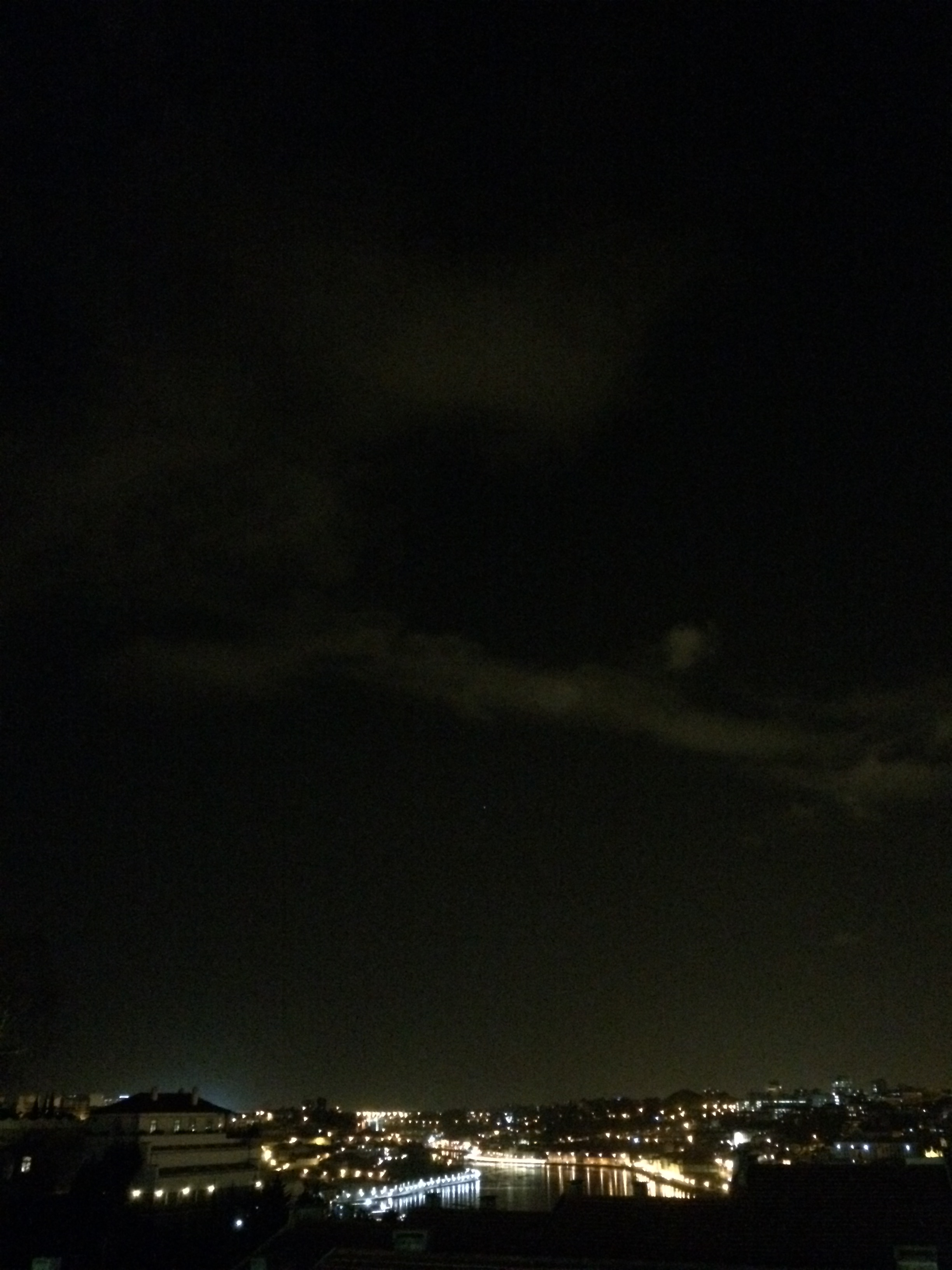 Portugal - January 2016